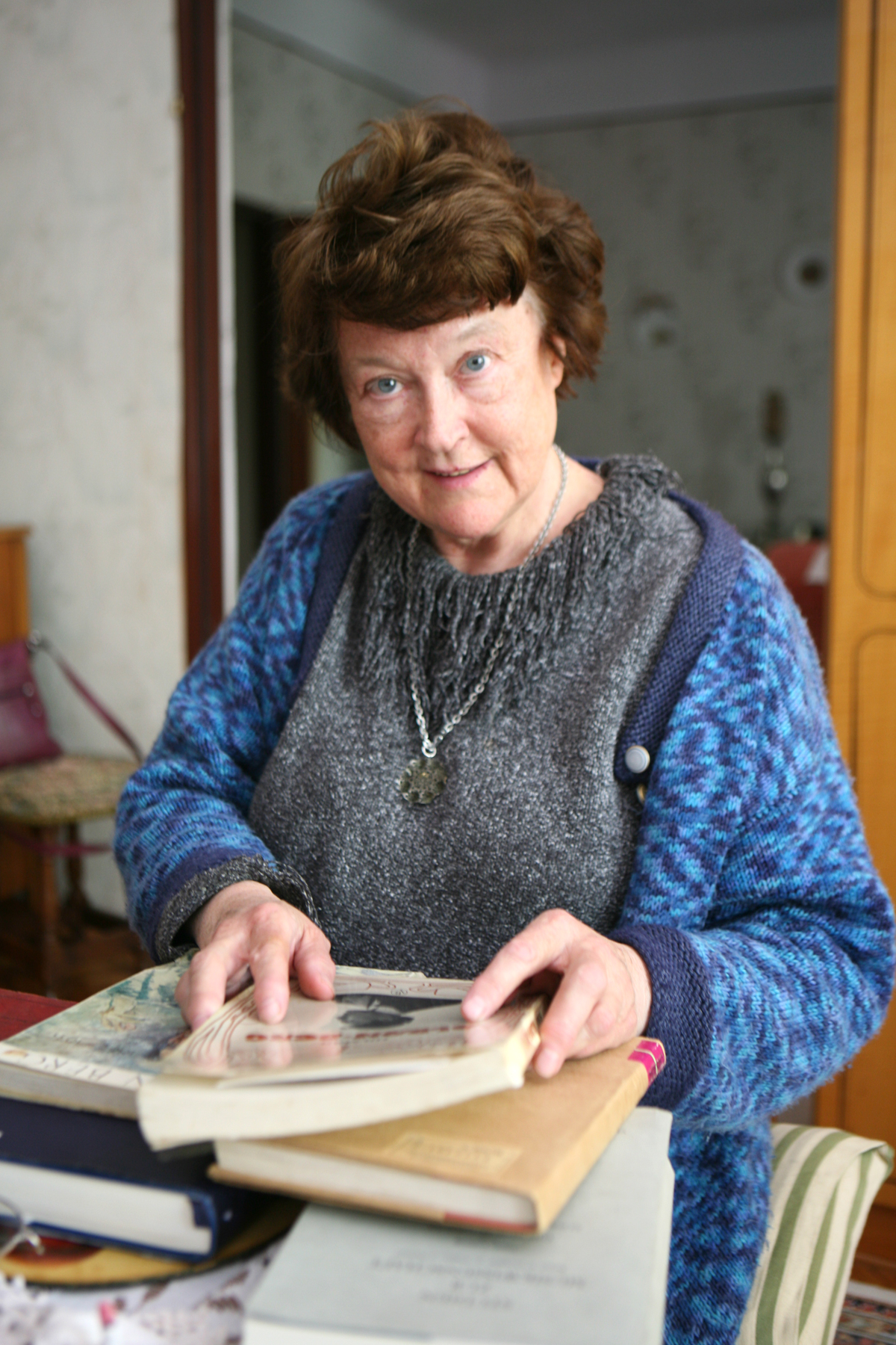 Rosemary Moravec in 2011